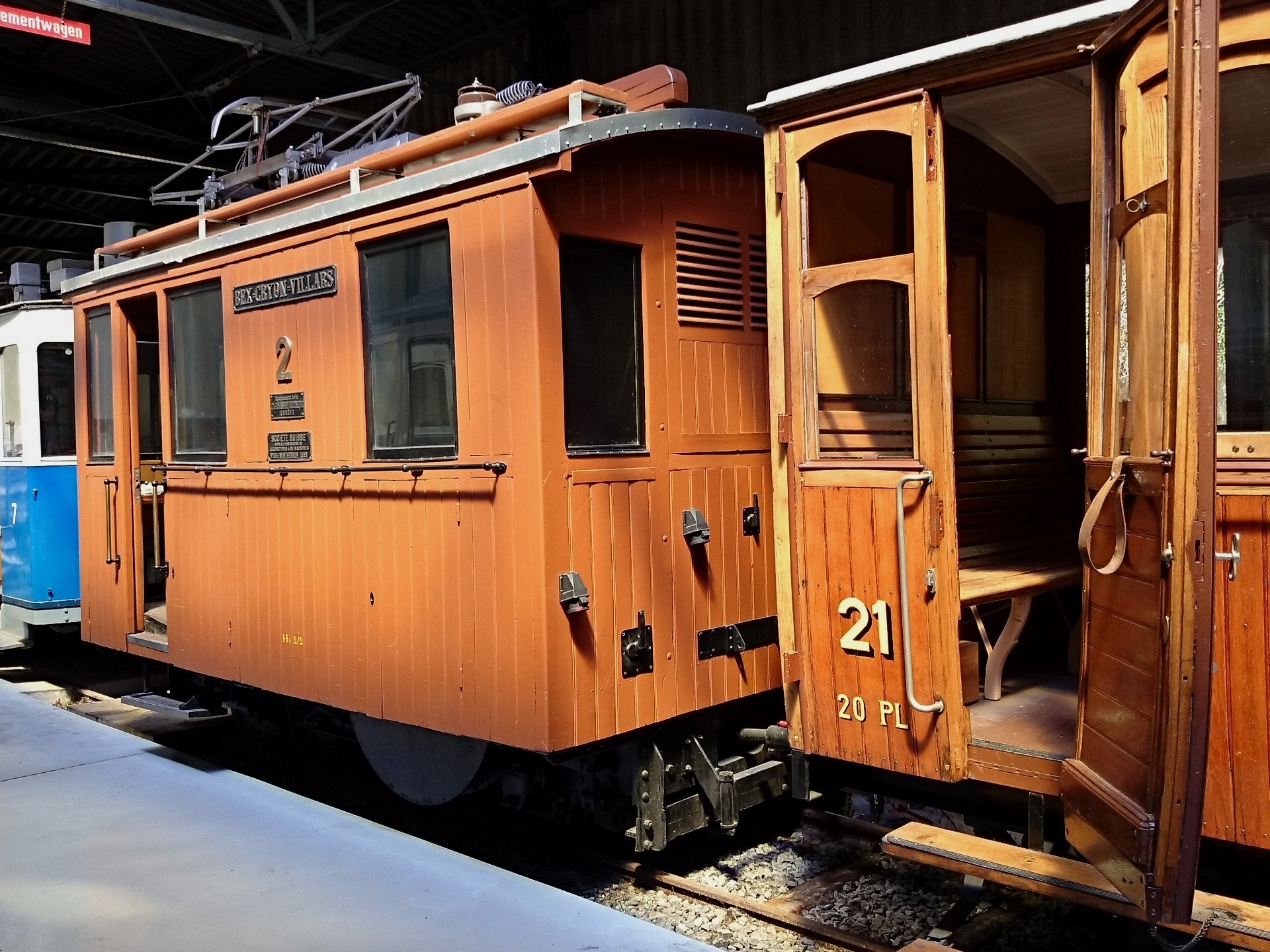 Links im Bild meterspurige elektrischeZahnradlokomotive He 2/2 der 2 Grisette ehemaligen Bex–Villars–Bretaye-Bahn (BVB), erbaut 1899 durch die Schweizerische Lokomotiv- und Maschinenfabrik (SLM) in Winterthur und der damalige Compagnie Industrielle Electrique (CIE) in Genf, der späteren Société Anonyme des Ateliers de Sécheron (SAAS), bei der Museumsbahn Blonay-Chamby (BC) in Chamby-Musée (Chaulin). Der Name La Grisette, in diesem Falle sinngemäss auf Deutsch übersetzt mit die Graue, erhielt die Lokomotive von ihrer lange innegehabten grauen Farbgebung. Anlässlich einer Aufarbeitung durch den Verein (Association) Ferroviaire Bex-Villars-Bretaye (BVB Promotion) erhielt sie in den 2000er Jahren wieder eine für diese Lokomotivbaureihe typisch braune Farbgebung. Rechts im Bild noch ein Teil des meterspurigen Abteilwagen CF2 21 der Zahnradbahn Aigle–Leysin (AL) mit geöffneter Tür.